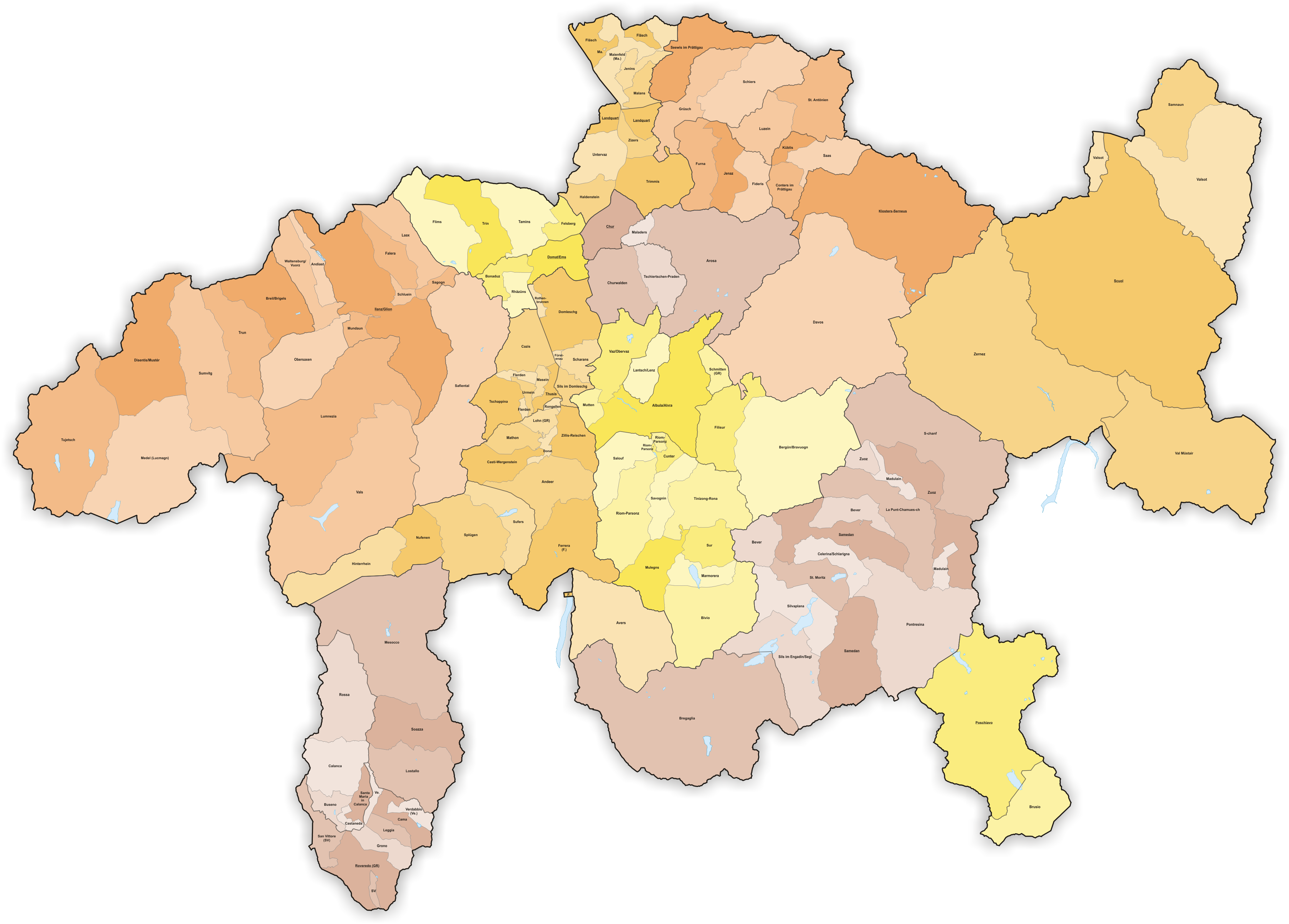 Municipalities in Canton Graubünden